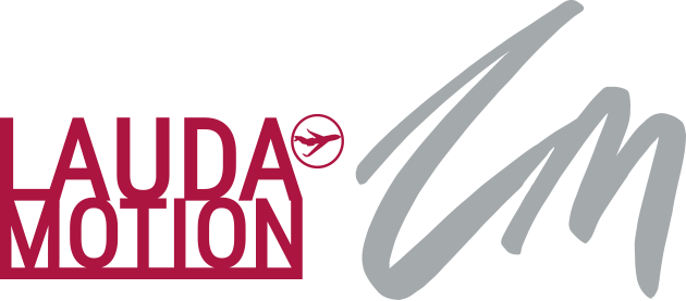 Logo der Lauda Motion Charterfluggesellschaft in Wien-Schwechat